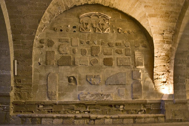 Cathédrale_de_Maguelone-Fragments_récupérés